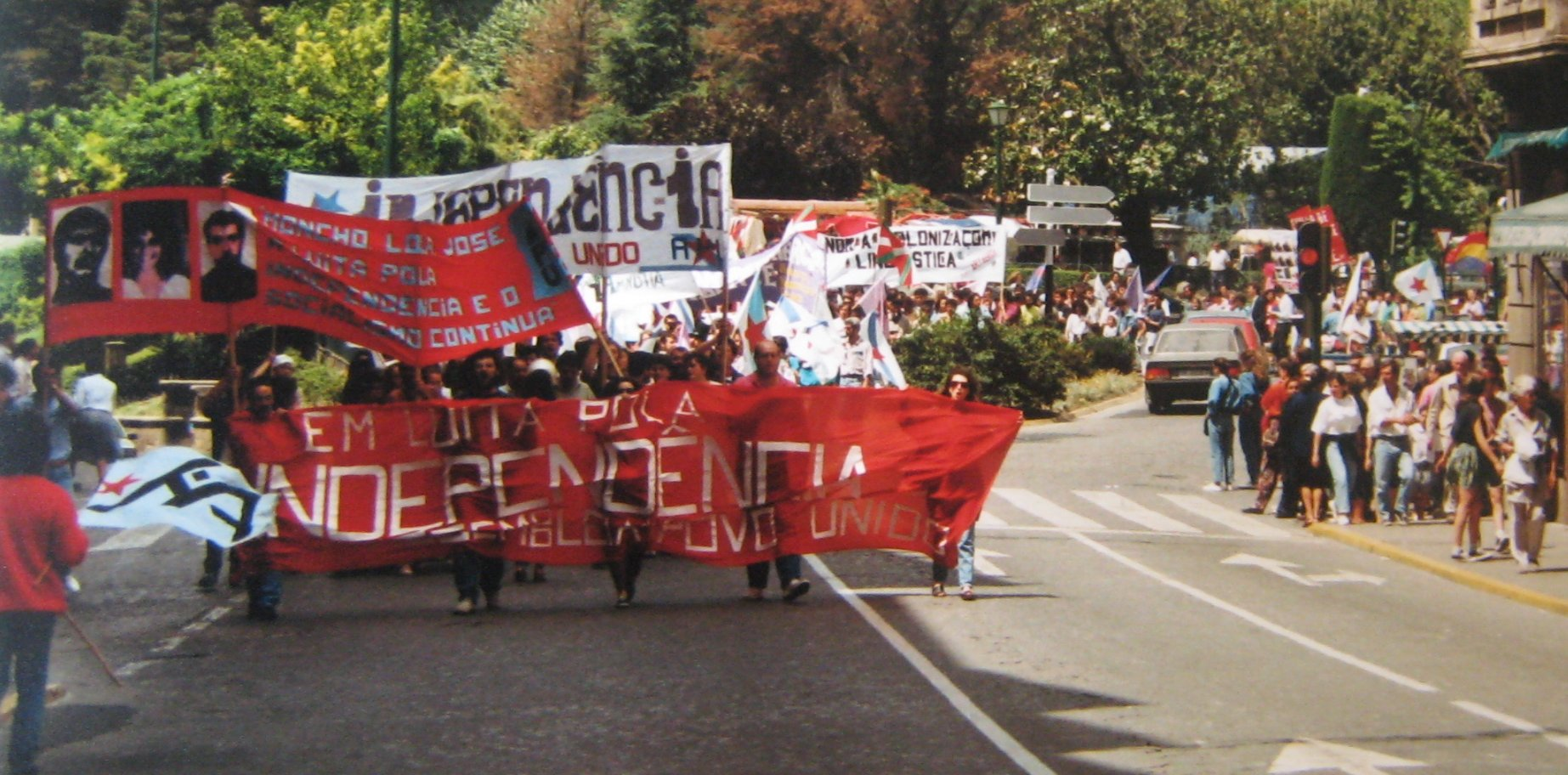 Manifestación da APU, 25 de xullo de 1991. Praza Roxa de Santiago